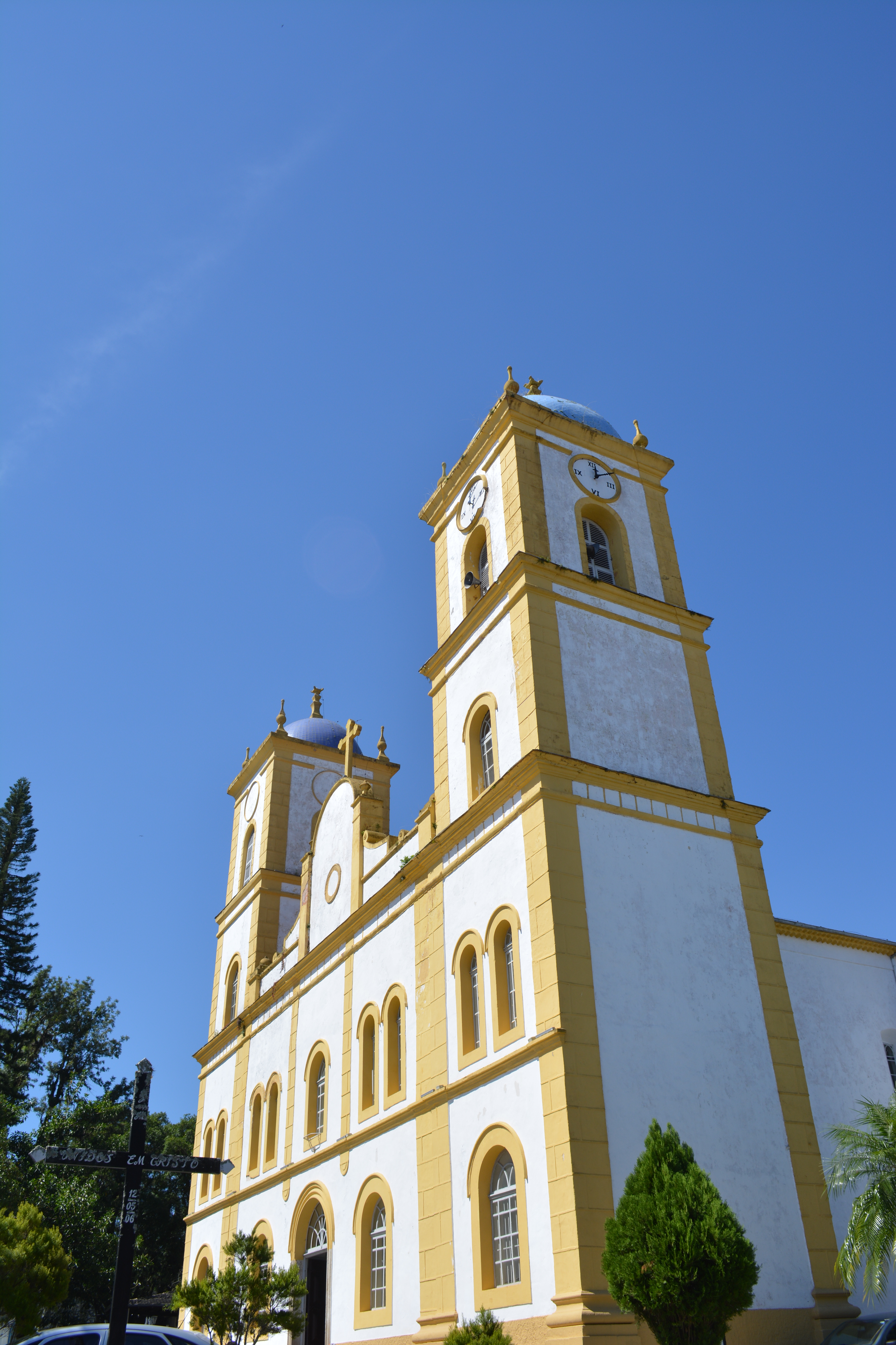 São Francisco do Sul, SC: centro histórico e paisagístico